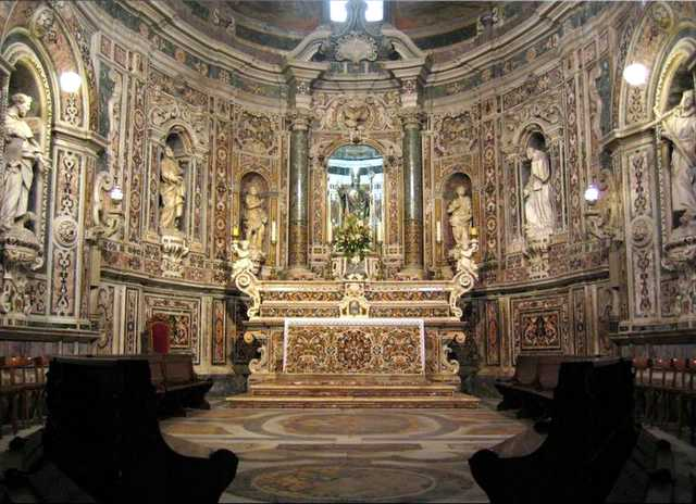 Chapel San Cataldo Taranto, Italy